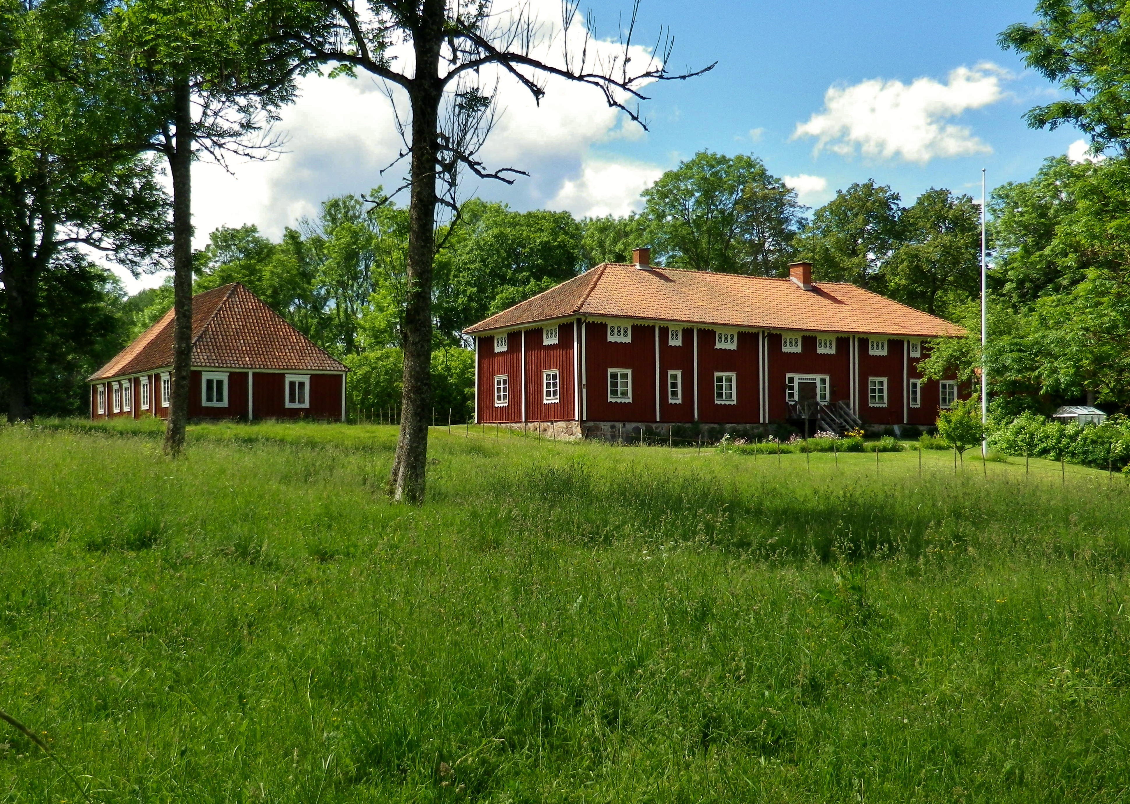 Linnefors Hovgård